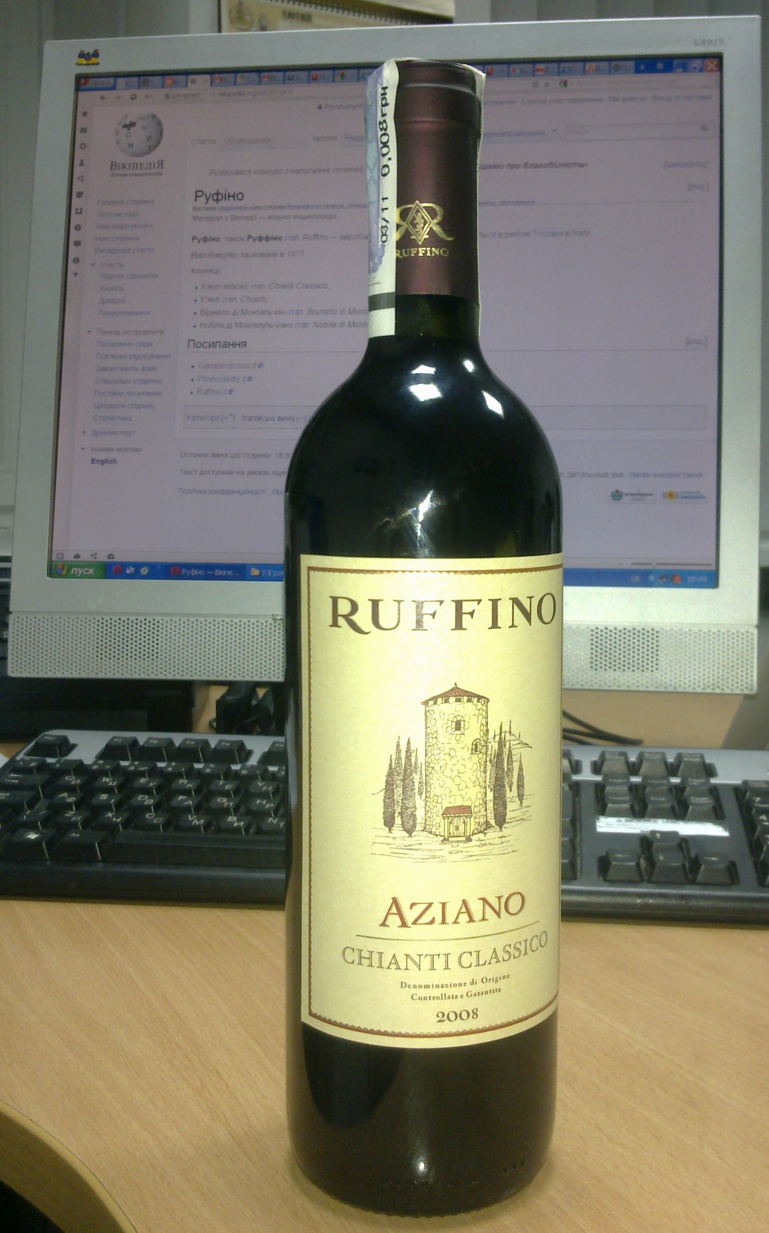 К'янті класіко урожаю 2008